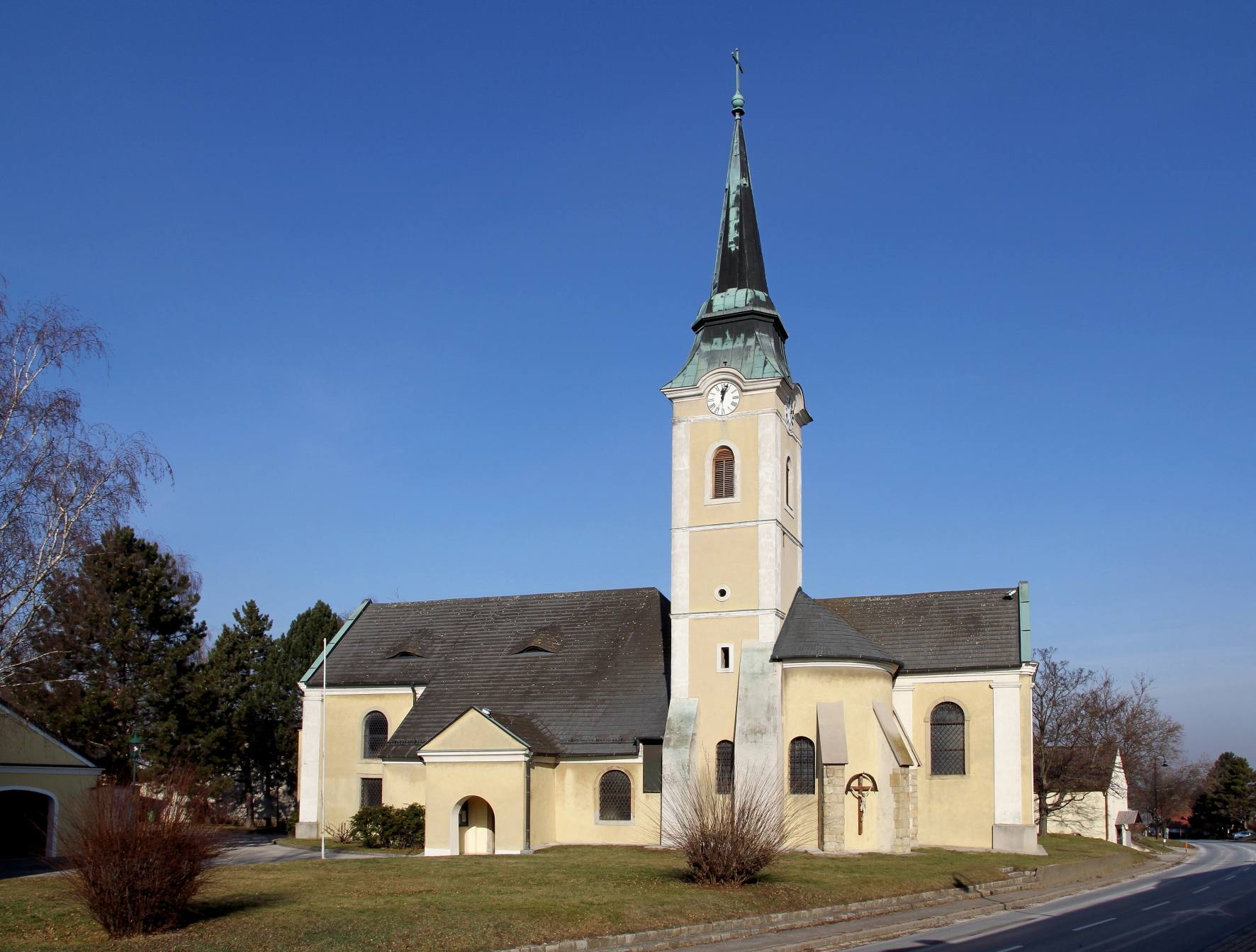 Katholische Pfarrkirche hl. Jakob der Ältere in der niederösterreichischen Gemeinde Leitzersdorf.